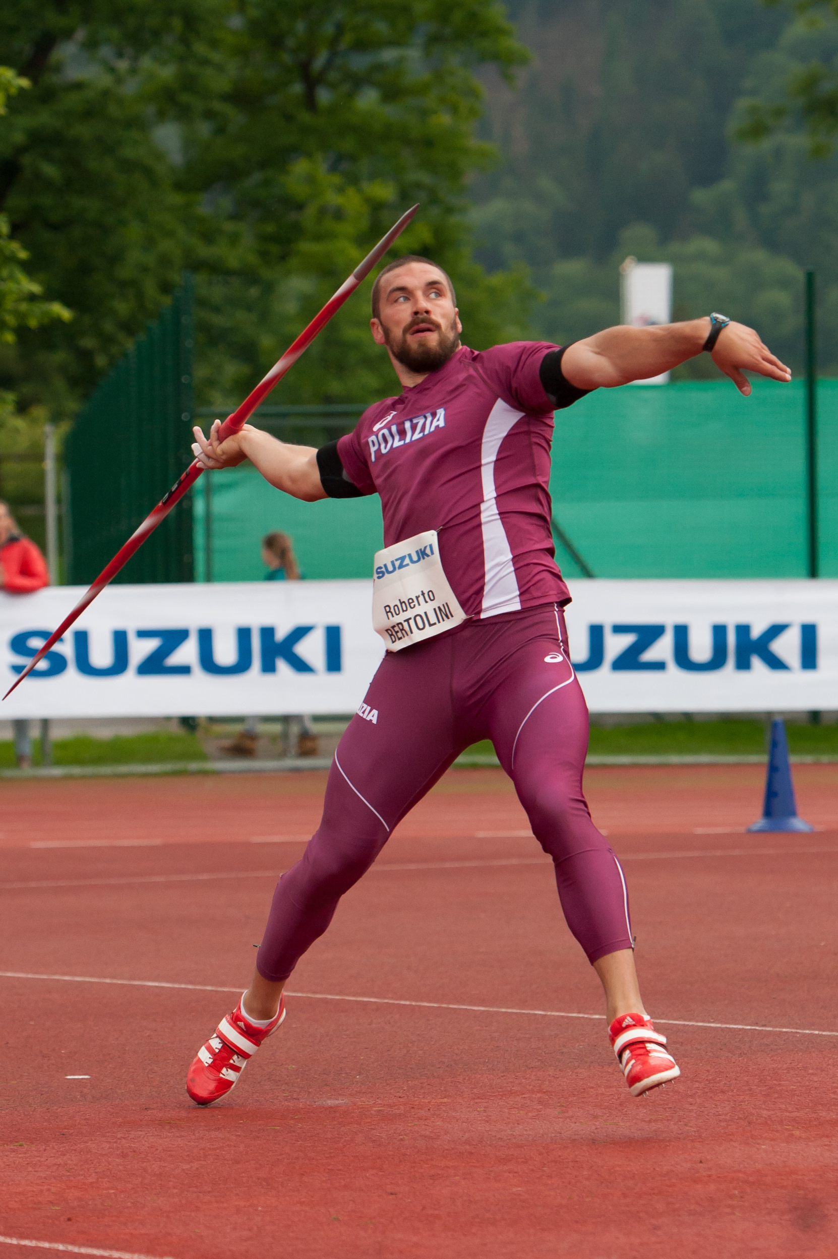 Salzburger Leichtathletik Gala am 27. Mai 2015: Roberto Bertolini